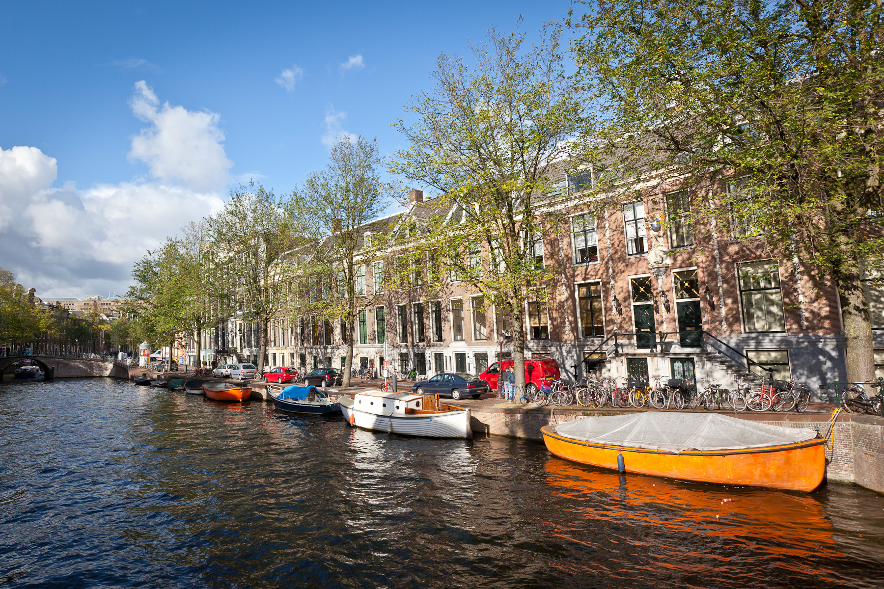 Amsterdam